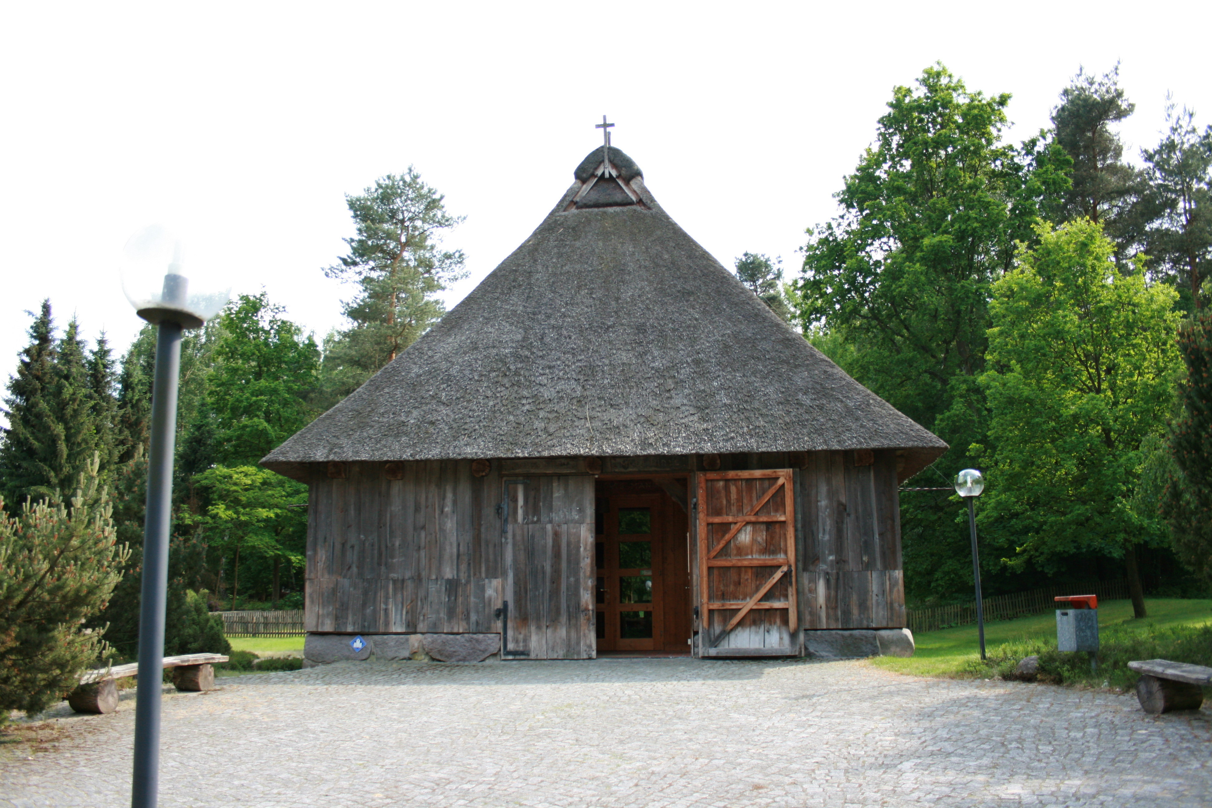 Schafstallkirche St. Martin in Munster (Örtze)